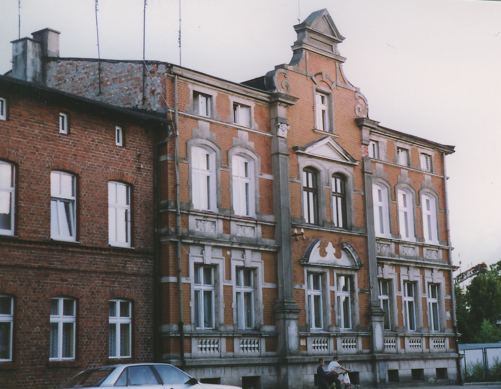 Sławno.Kamienice przy ulicy Koszalińskiej. Widok na kamienicę nr 11 z około 1900 roku. Zachowana secesyjna fasada.